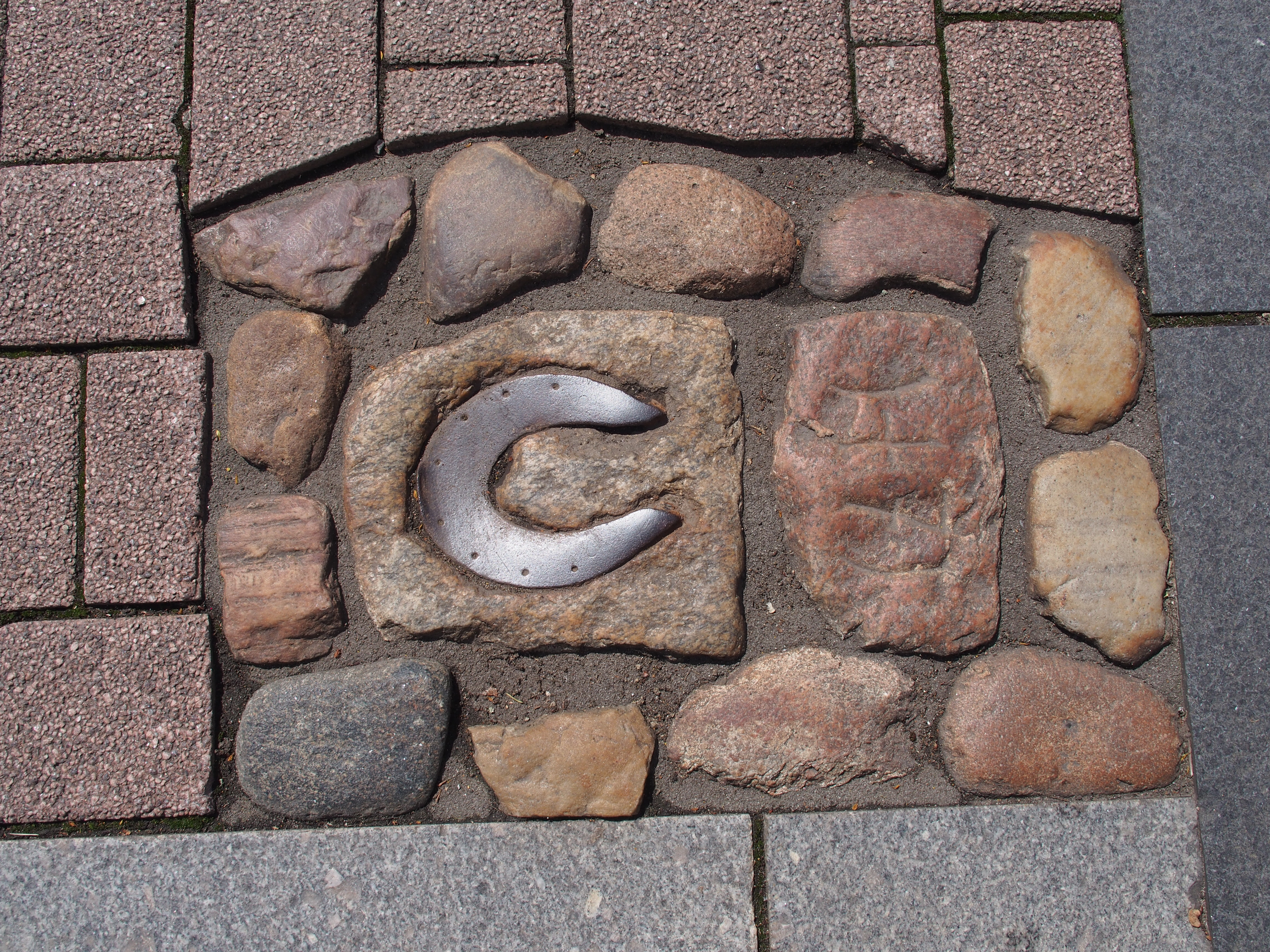 Einer Legende nach soll Herzog Otto V. (Braunschweig-Lüneburg) der Großmütige bei einem Turnier auf der Celler Stechbahn ums Leben gekommen sein. Ein Hufeisen im Pflaster kennzeichnet heute die Stelle, an der 1471 Herzog Otto V. verunglückt sein soll.